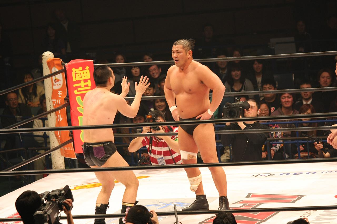 Minoru Suzuki